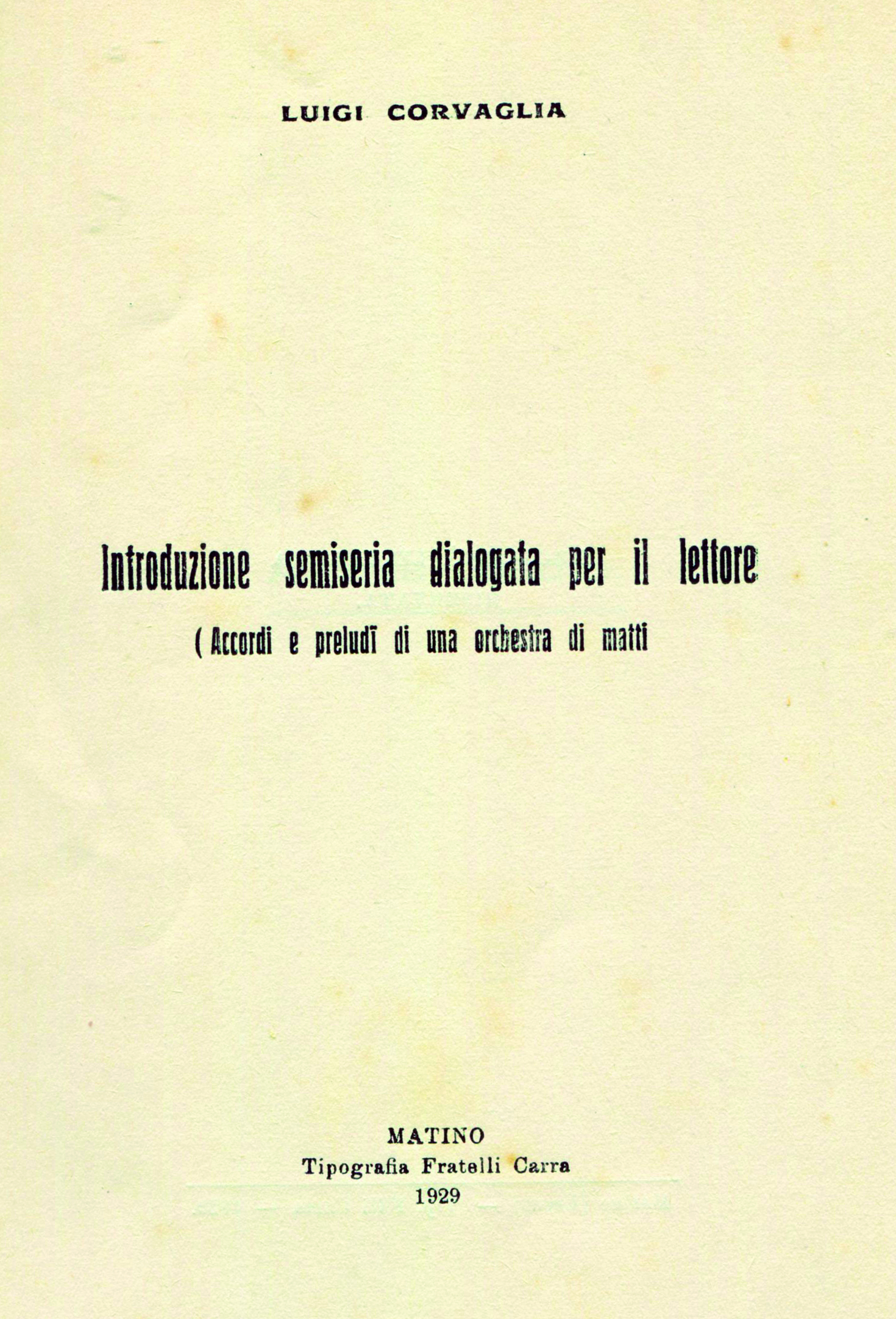 Introduzione semiseria dialogata per il lettore- L. Corvaglia